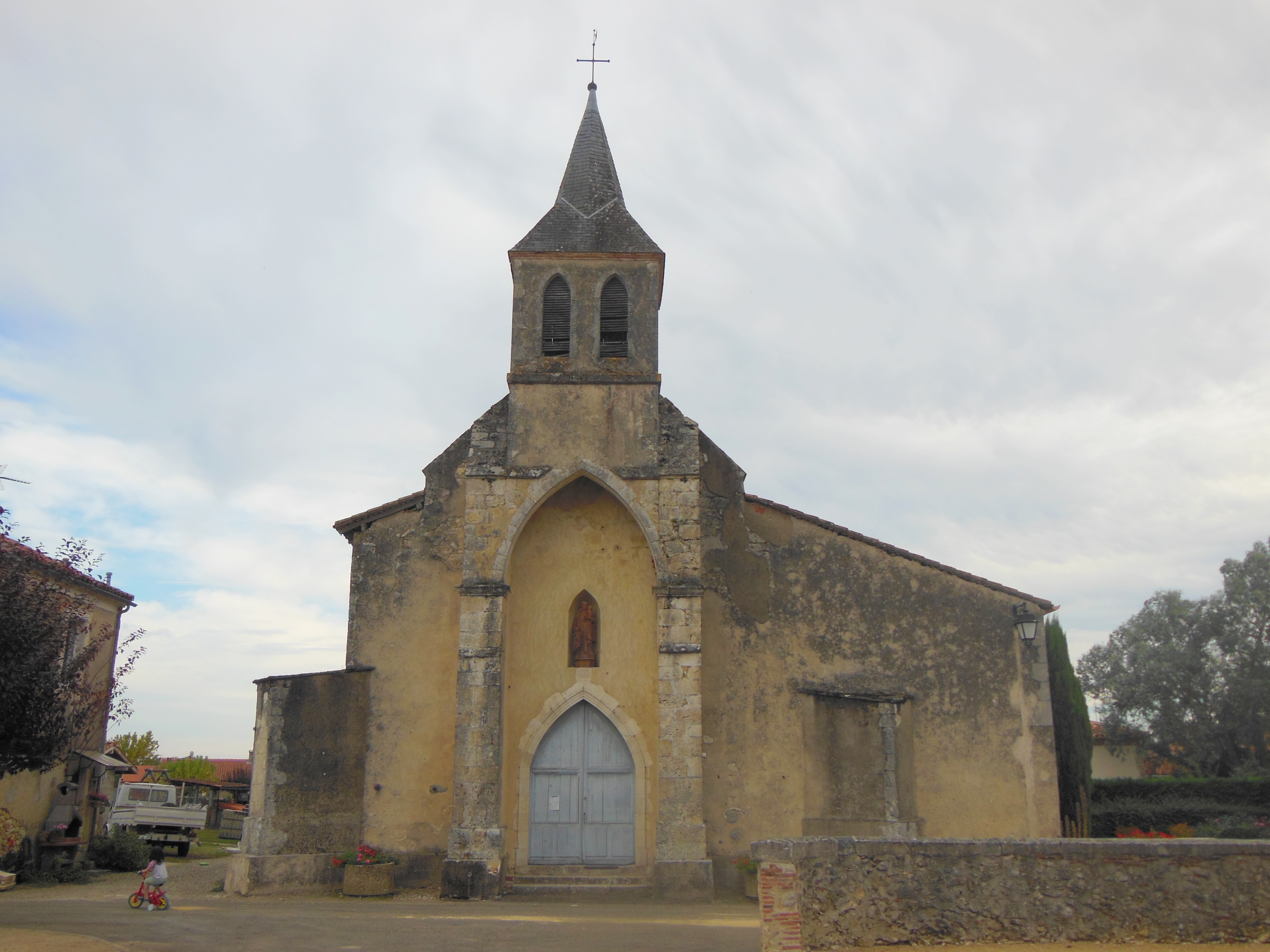 Église Saint-Pierre-aux-Liens de Betbezer-d'Armagnac, dans le département français des Landes